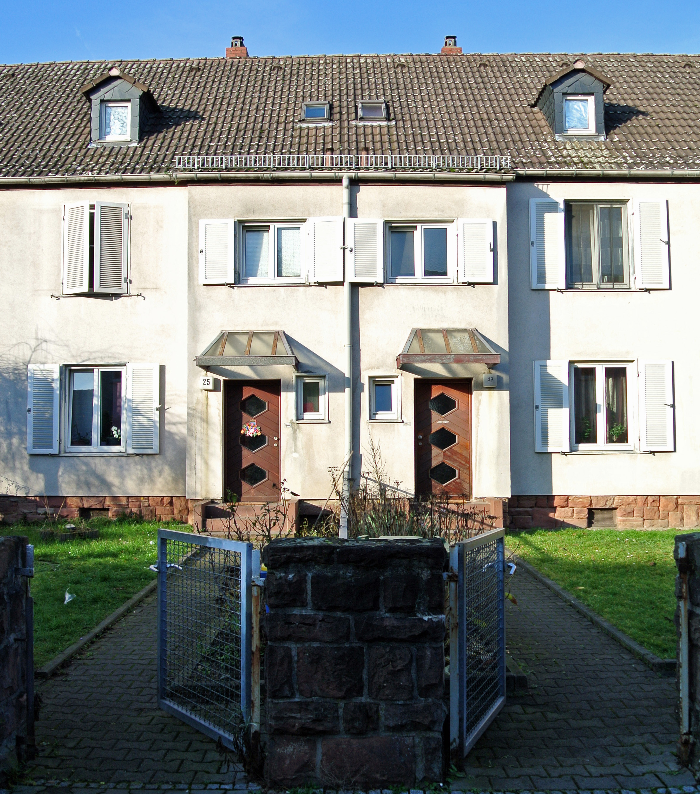 Kuhwaldsiedlung in Frankfurt-Bockenheim; 1919-1922; Heimstätte; Scherbiusstraße, Gebäudeeingänge